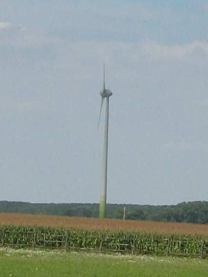 Szélerőmű, Mecsér, Magyarország